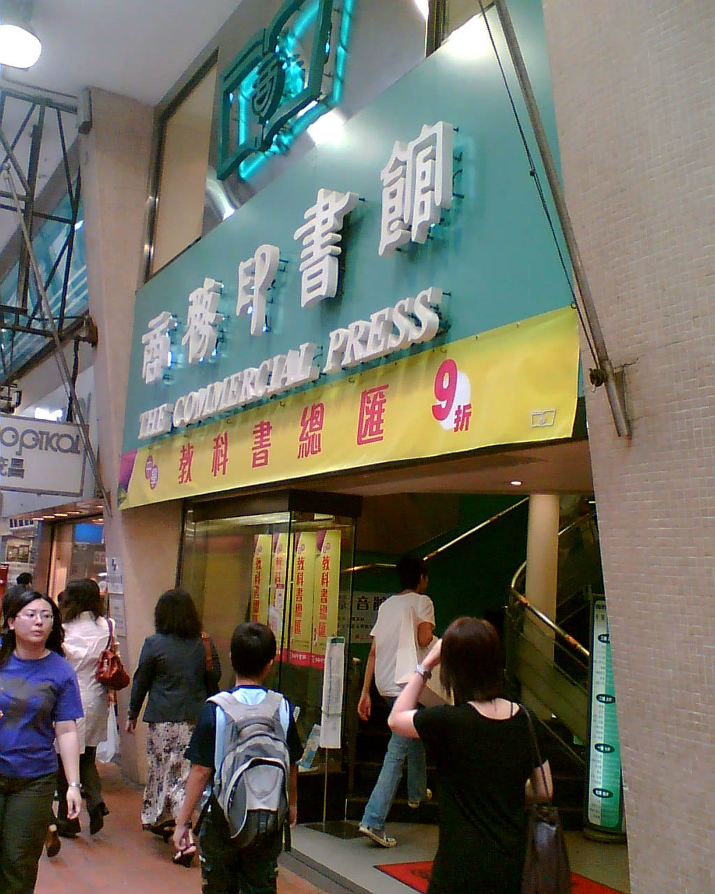 香港銅鑼灣商务印书馆